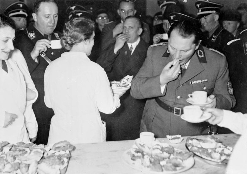 Zentralbild "Grüne Woche" in Berlin (1937) Am 29. Januar 1937 eröffnete der faschistische Ministerpräsident des Nazi-Reiches, Hermann Göring(rechts), die "Grüne Woche". Auf einer für den faschistischen Raubkrieg vorbereitenden Sonderschau "Sparsame Hausfrau" probierten Göring und Reichsbauernführer R.W. Darré (links) Brotaufstrich aus Rohkost. Diese Schau wurde vom Deutschen Frauenwerk, einer Gliederung der NSDAP, durchgeführt. [Scherl Bilderdienst]